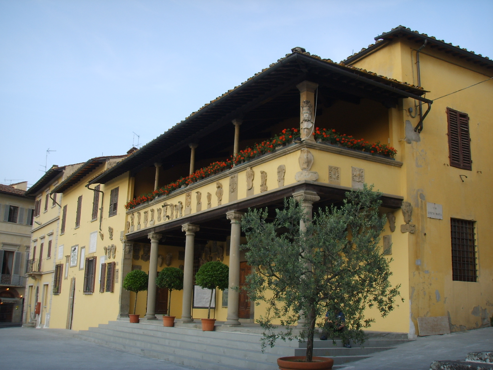 Palazzo pretorio di fiesole